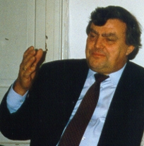 Anton Pfeifer 1997 bei einer Diskussion der JU Münsingen